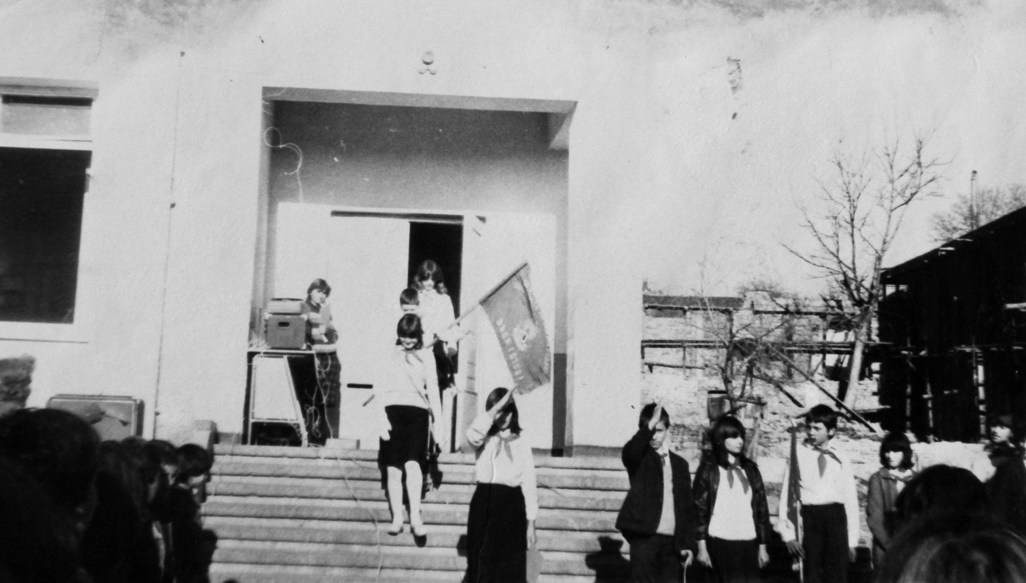 Ученици от ОУ „Св. Св. Кирил и Методий” - с. Туховища отбелязват датата 3-ти март с празнично настроение.